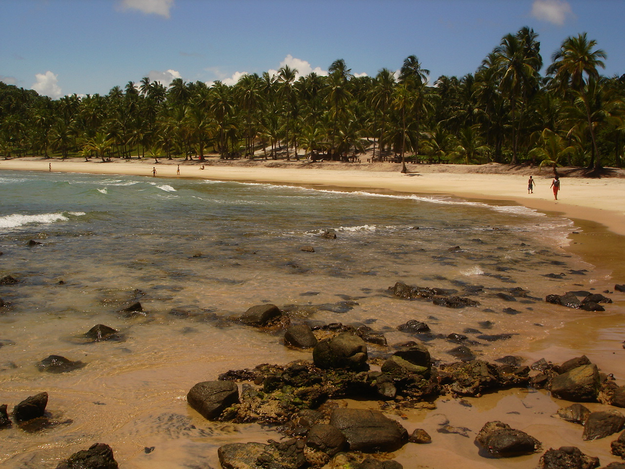 Prainha, Itacaré, Bahia